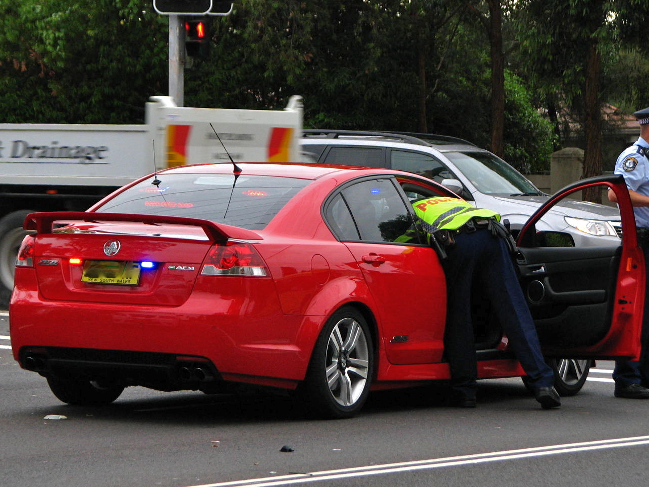 Parramatta 201 VE Commodore SS